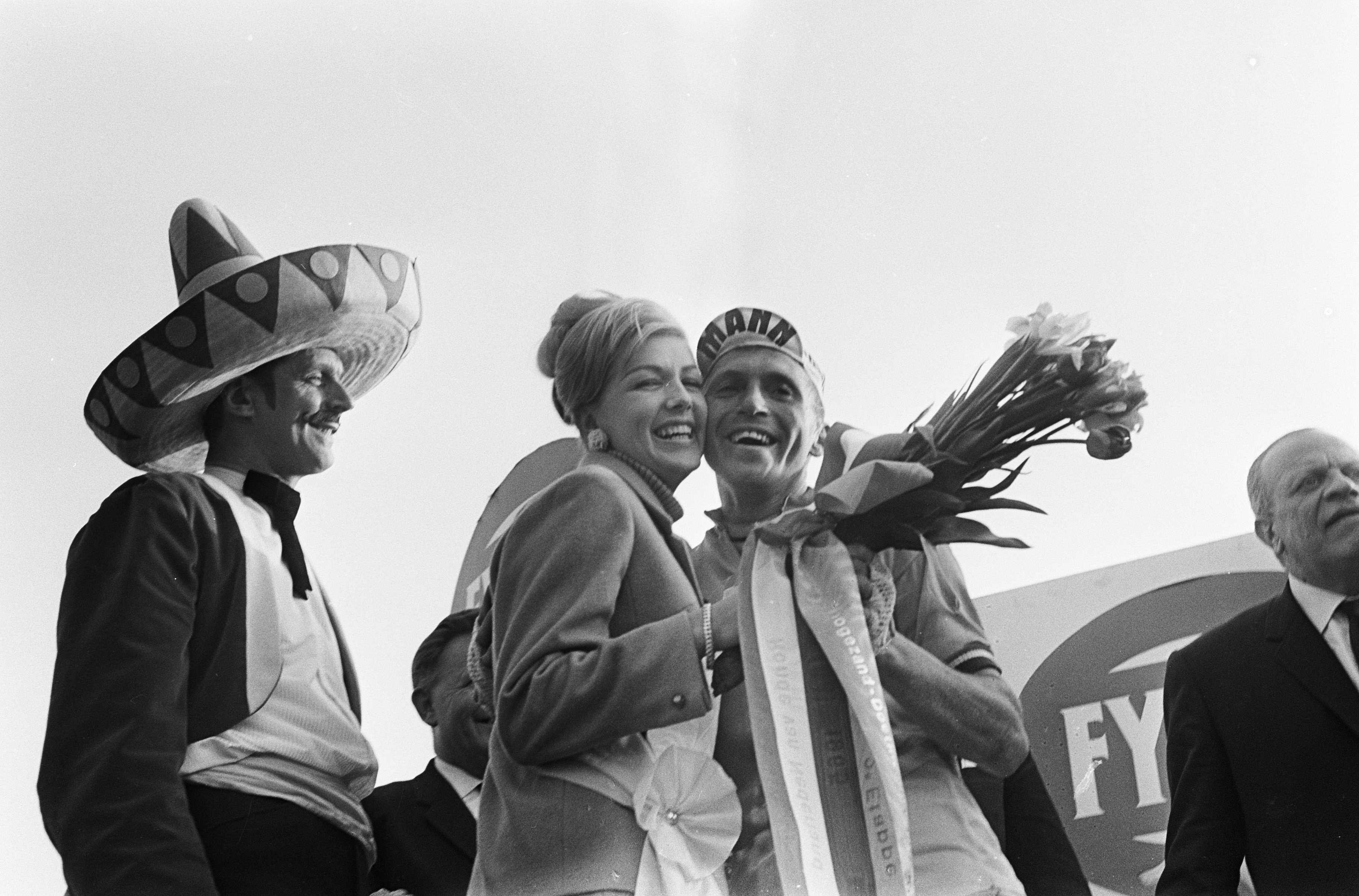 Collectie / Archief : Fotocollectie Anefo Reportage / Serie : [ onbekend ] Beschrijving : Ronde van Nederland, finish te Doetinchem, Miss Europa Elly Koot feliciteert Norbert Kerckhove Datum : 13 mei 1965 Locatie : Doetinchem Trefwoorden : felicitaties, missen, sport, wielrennen Persoonsnaam : Kerckhove, Norbert, Koot, Elly Instellingsnaam : Ronde van Nederland Fotograaf : Koch, Eric / Anefo Auteursrechthebbende : Nationaal Archief Materiaalsoort : Negatief (zwart/wit) Nummer archiefinventaris : bekijk toegang 2.24.01.05 Bestanddeelnummer : 917-7654